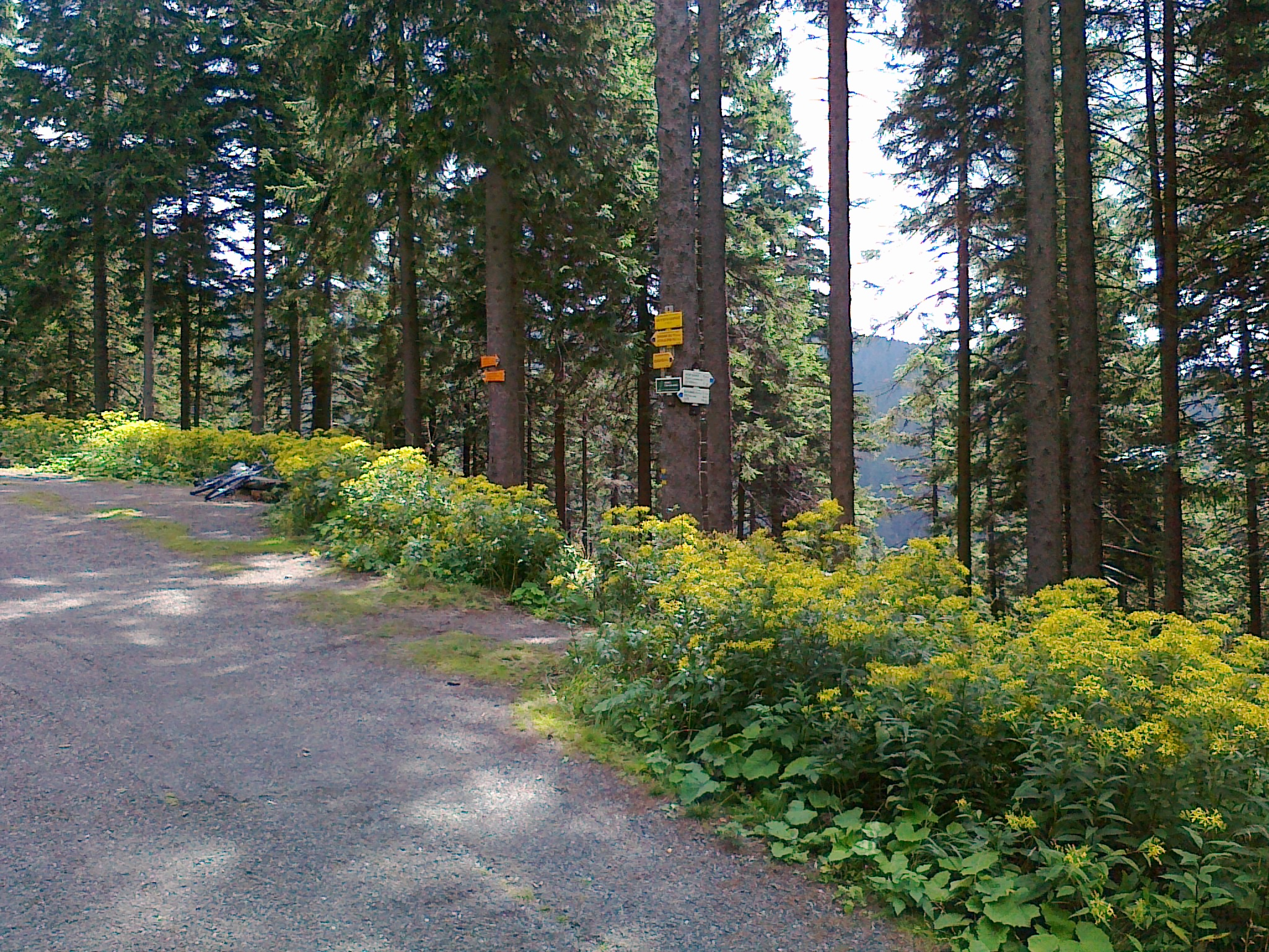 Miejsce o nazwie Nad Vysokým Vodopádem - 1125 m n.p.m.